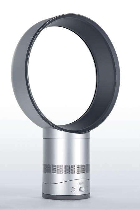 Вентилятор Dyson модель AM01